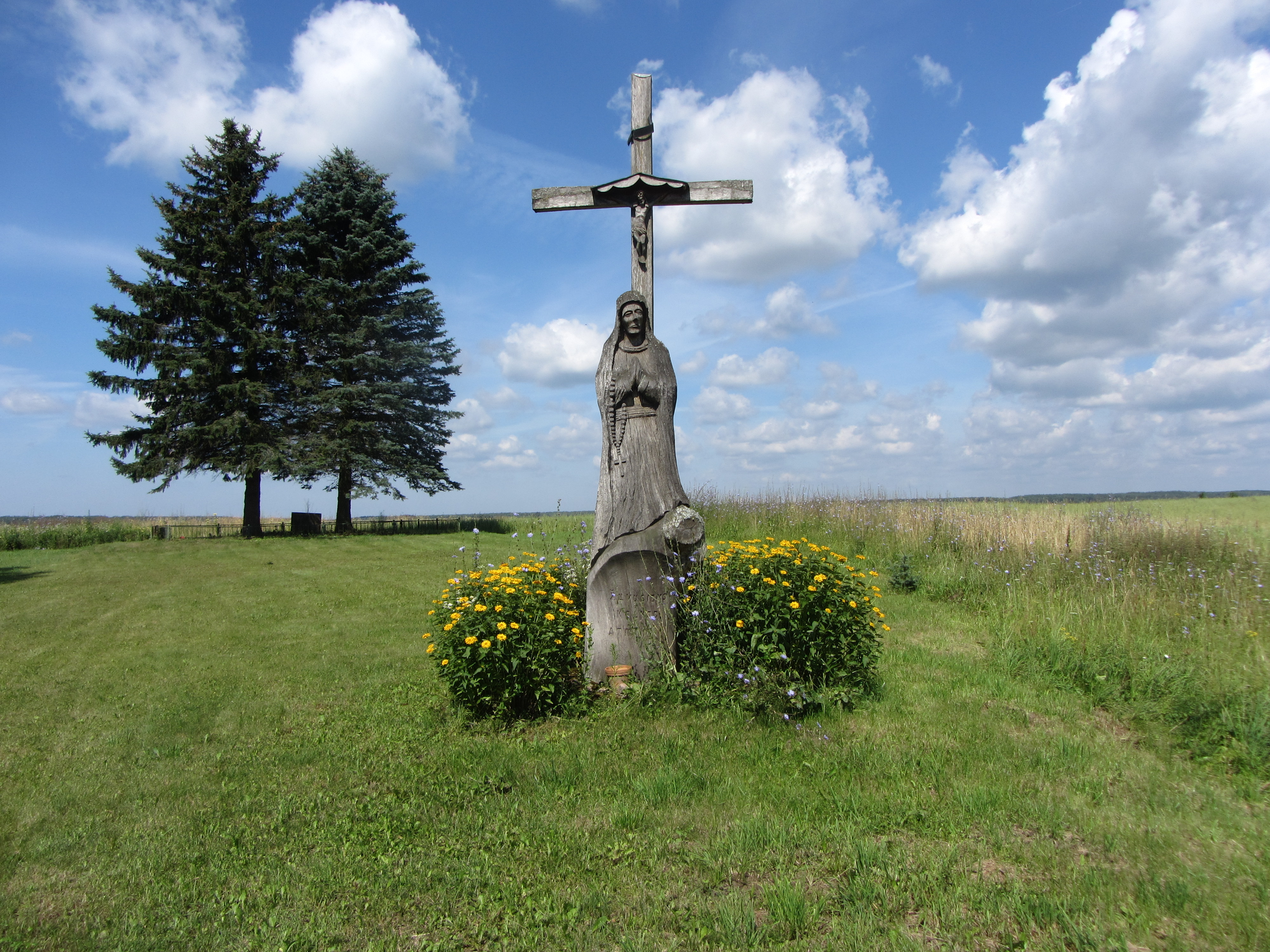 Užuperkasis, Lithuania